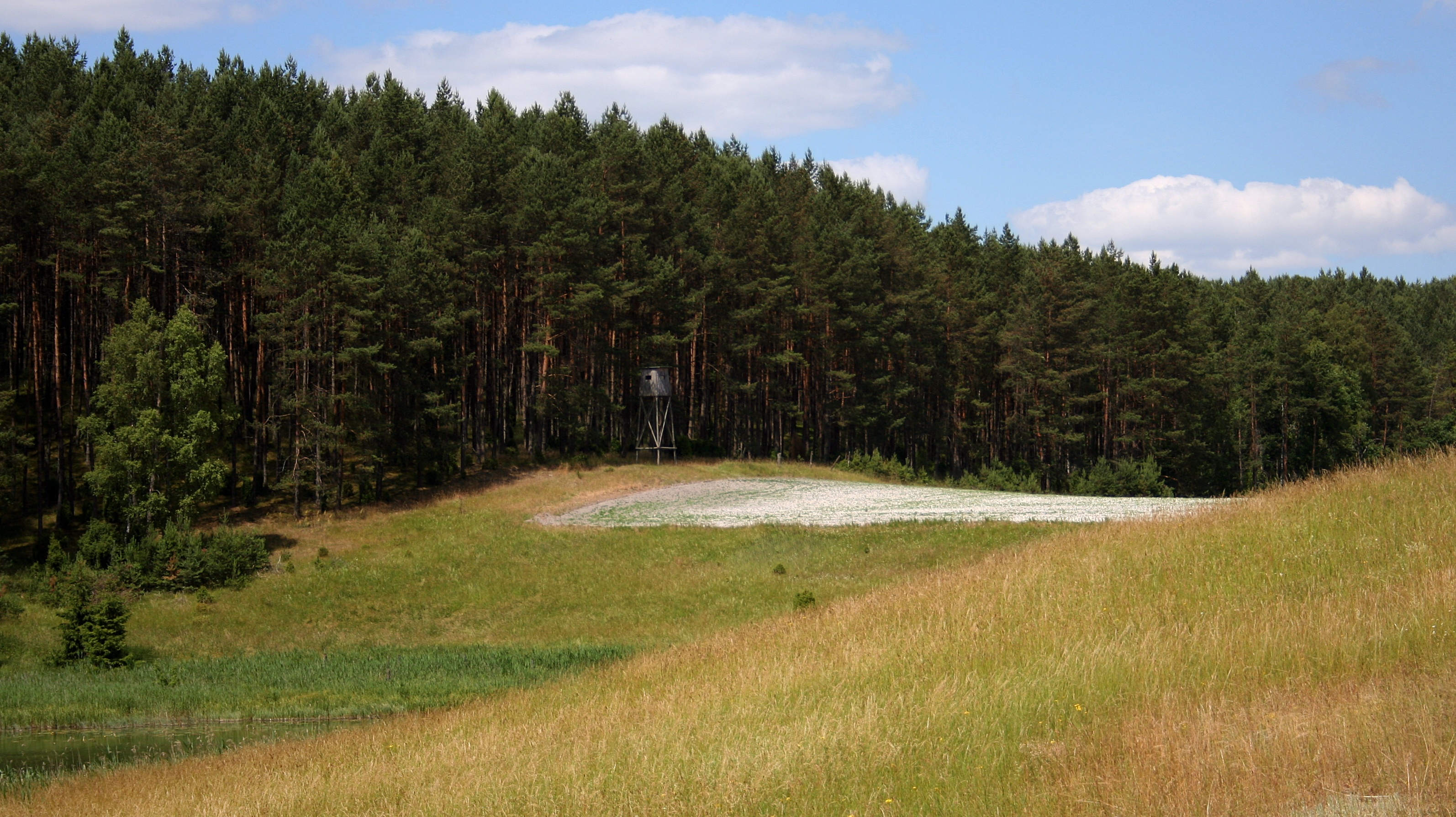 Zaborski Park Krajobrazowy, fragment krajobrazu Doliny Kulawy